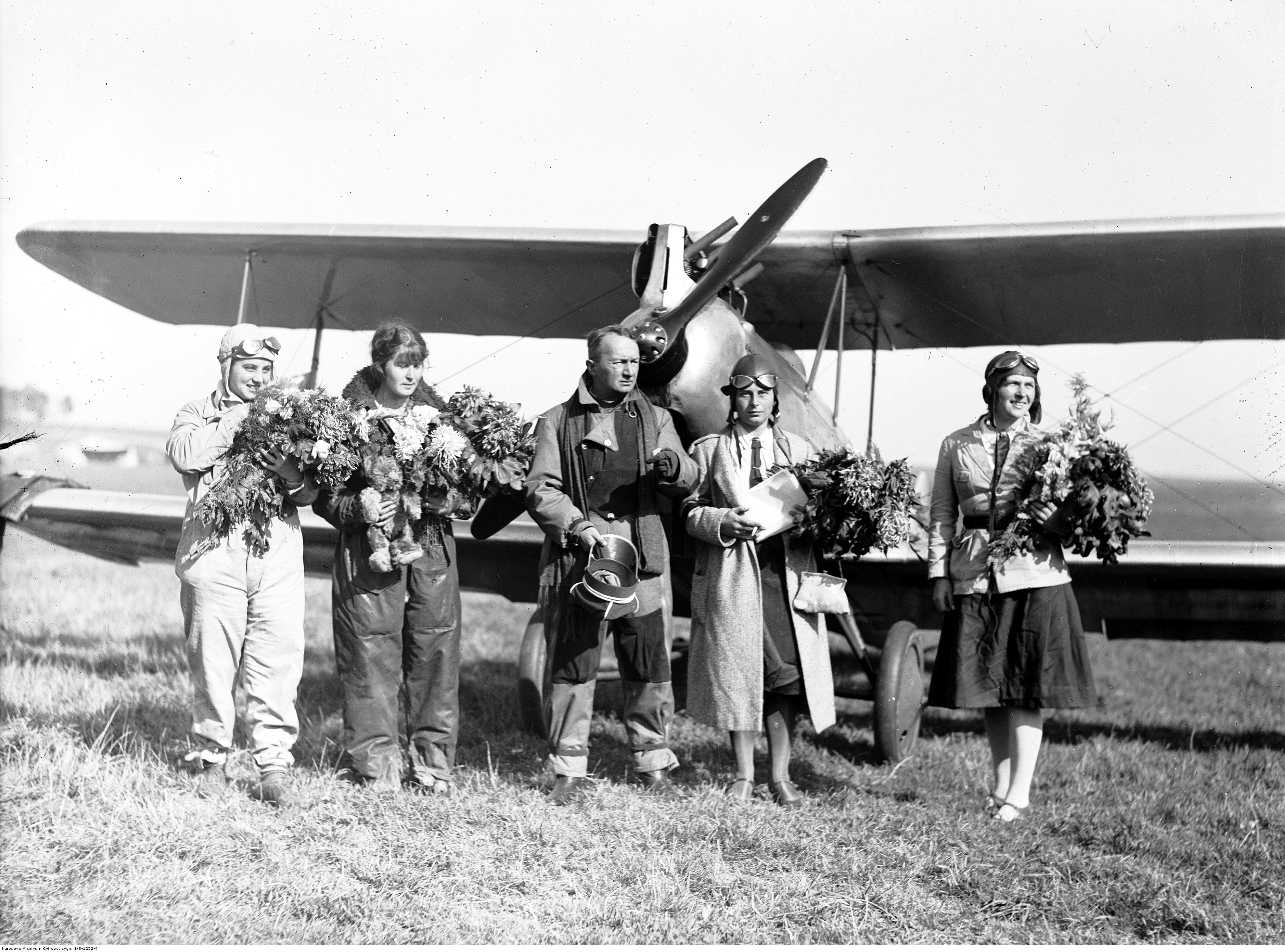 Zakończenie w Krakowie rajdu lotniczego kobiet dookoła Polski; październik 1931. Uczestnicy rajdu przed samolotem PZL.5. Stoją od lewej: obserwatorka Maria Lierówna, pilot Danuta Sikorzanka, ppłk Stanisław Jasiński, pilot Wanda Olszewska i pilot Maria Wardasówna. Koncern Ilustrowany Kurier Codzienny - Archiwum Ilustracji. Sygnatura: 1-S-1252-4